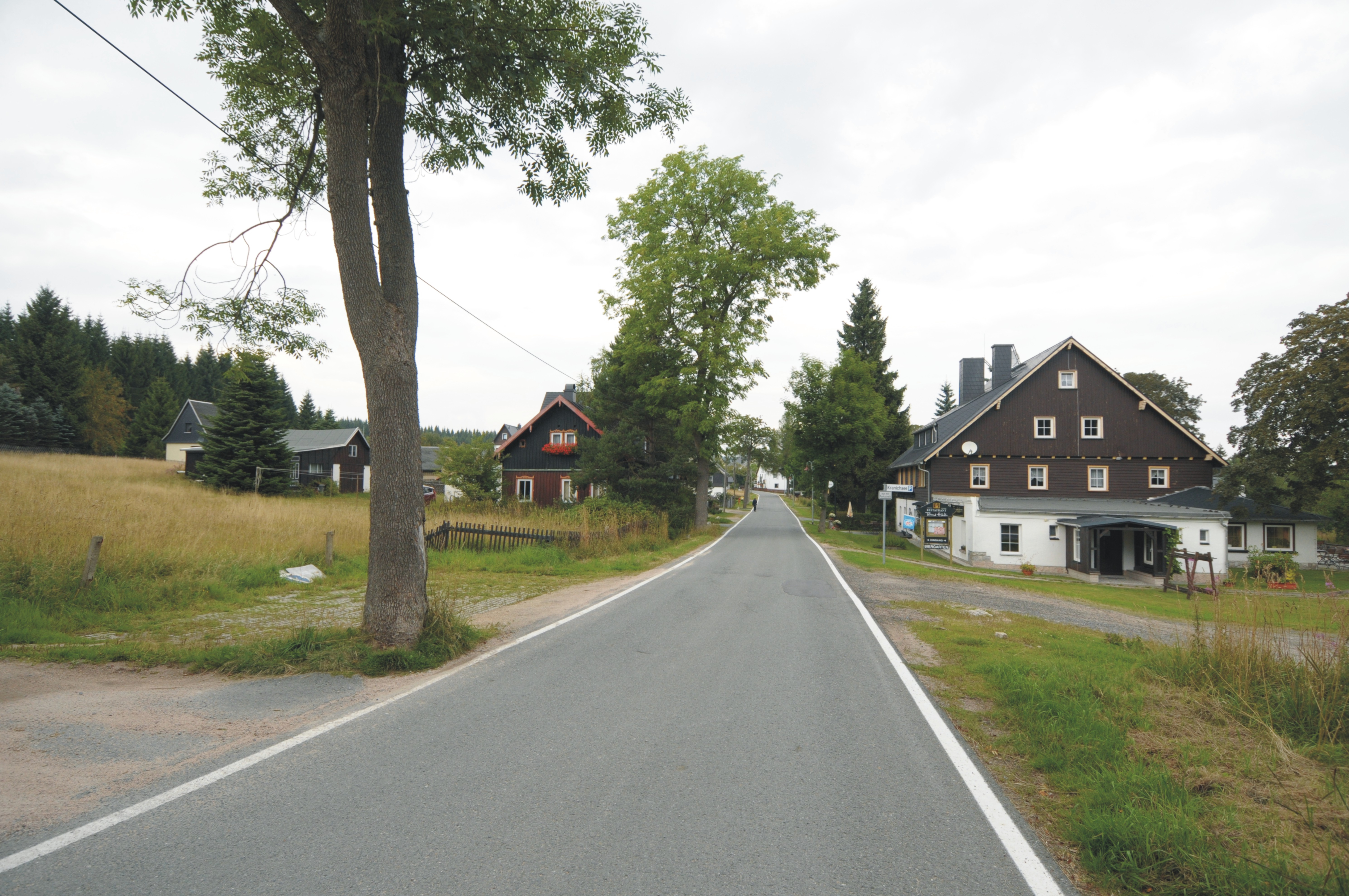 Weitersglashütte, Ansicht von der Hauptstraße (Gemeinde Eibenstock, Sachsen, Deutschland)